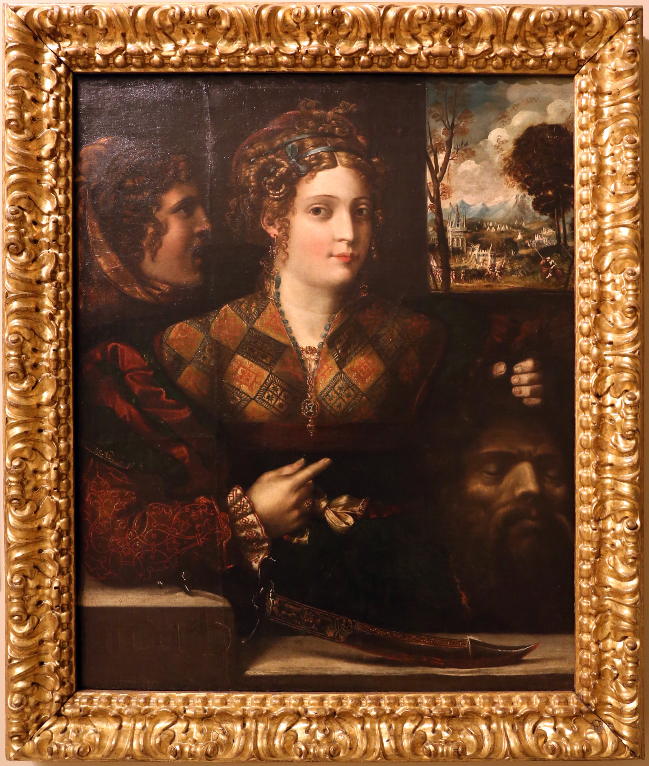 Palazzo dei Musei (Modena) This is a photo of a monument which is part of cultural heritage of Italy.